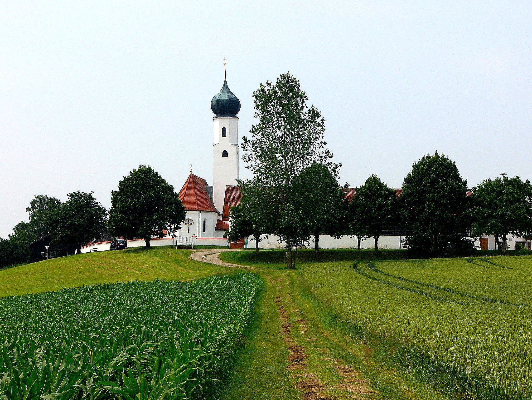 Katholische Filialkirche St Michael, spätgotische Saalkirche, Langhausmauern z. T. romanisch, Ausbau im 15. und 17. Jahrhundert; mit Ausstattung; Friedhofsummauerung.This is a photograph of an architectural monument.